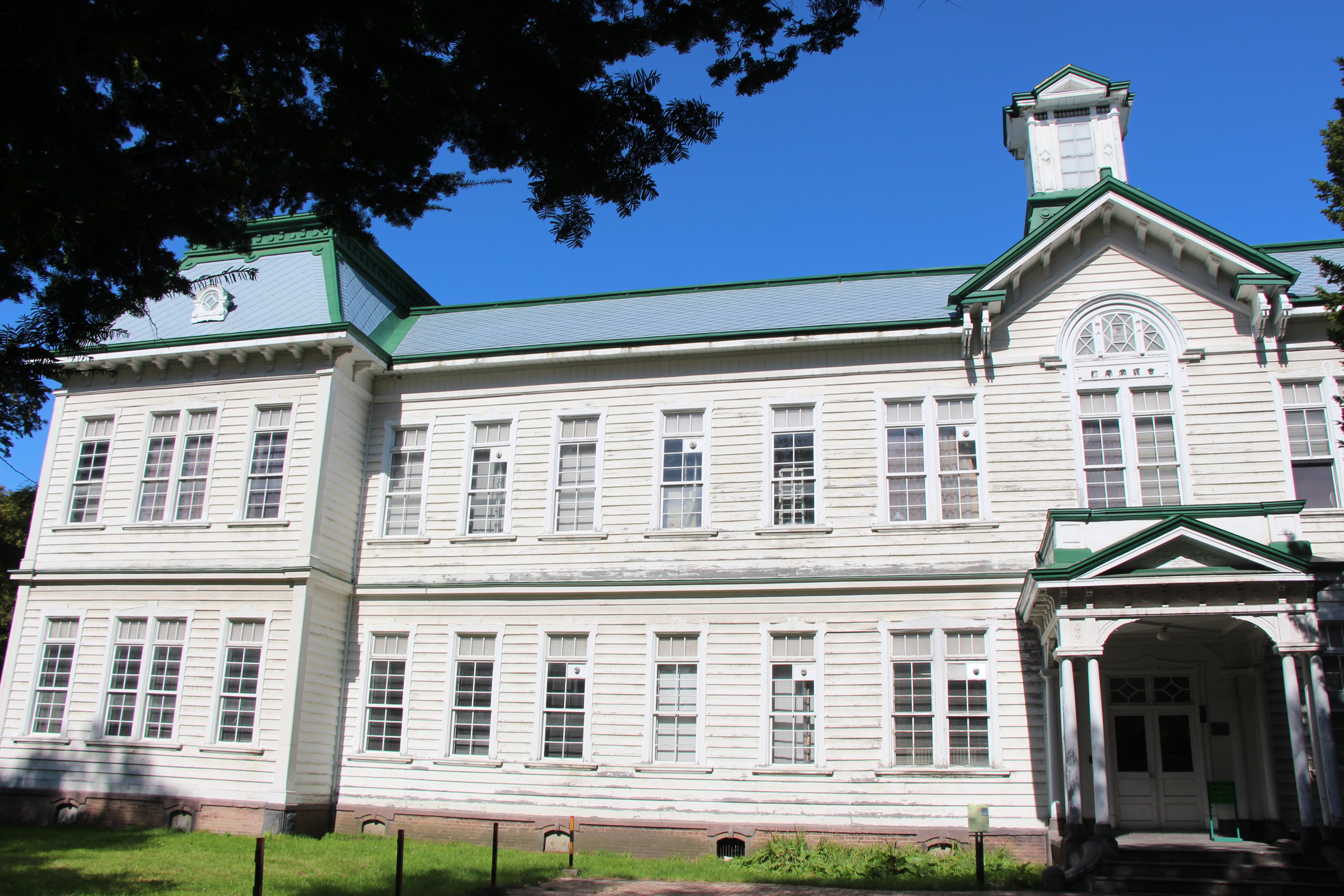 2016/10/01 撮影